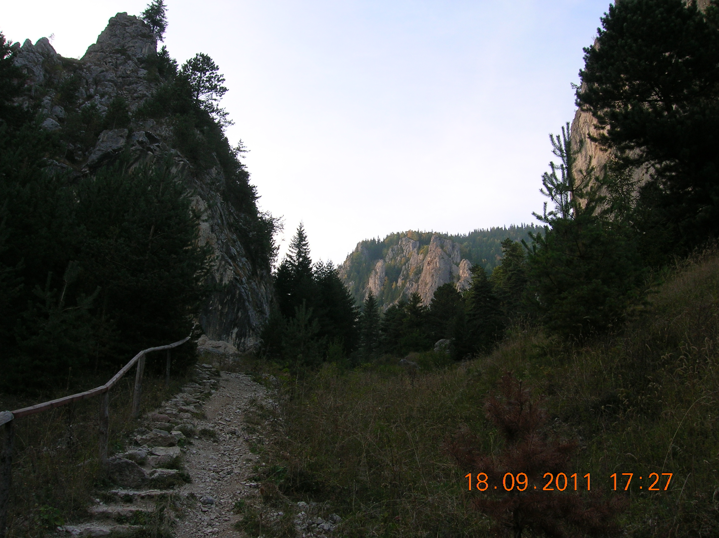 Cheile Şugăului, Rezervaţia Cheile Şugăului-Munticelu, Parcul Naţional Cheile Bicazului-Hăşmaş, Judeţul Neamţ, România